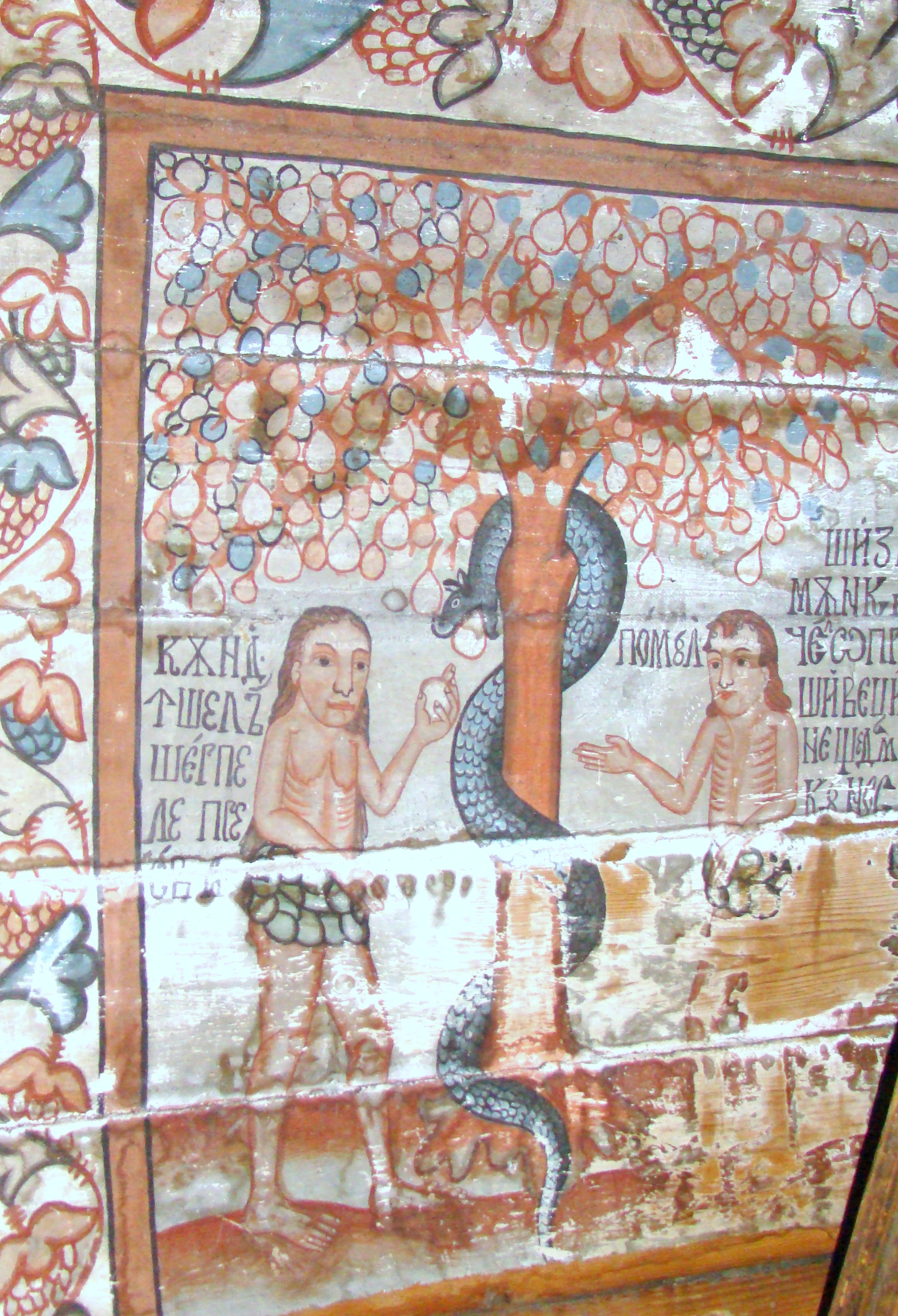 Biserica de lemn „Sf.Dumitru” din Larga, județul Maramureș